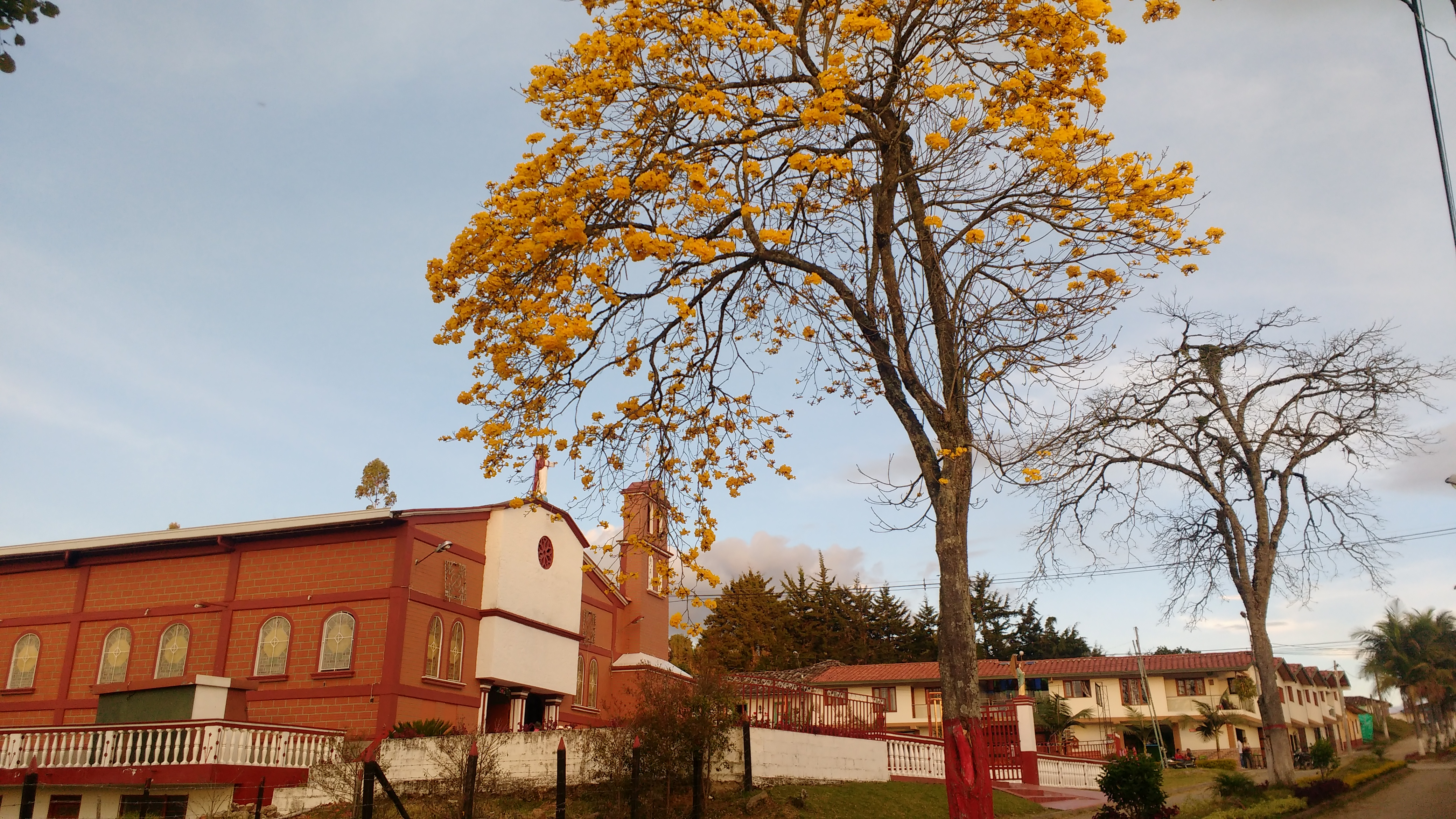 abejorral